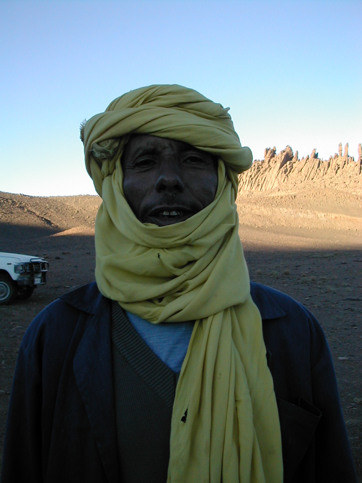 Targui, Algérie